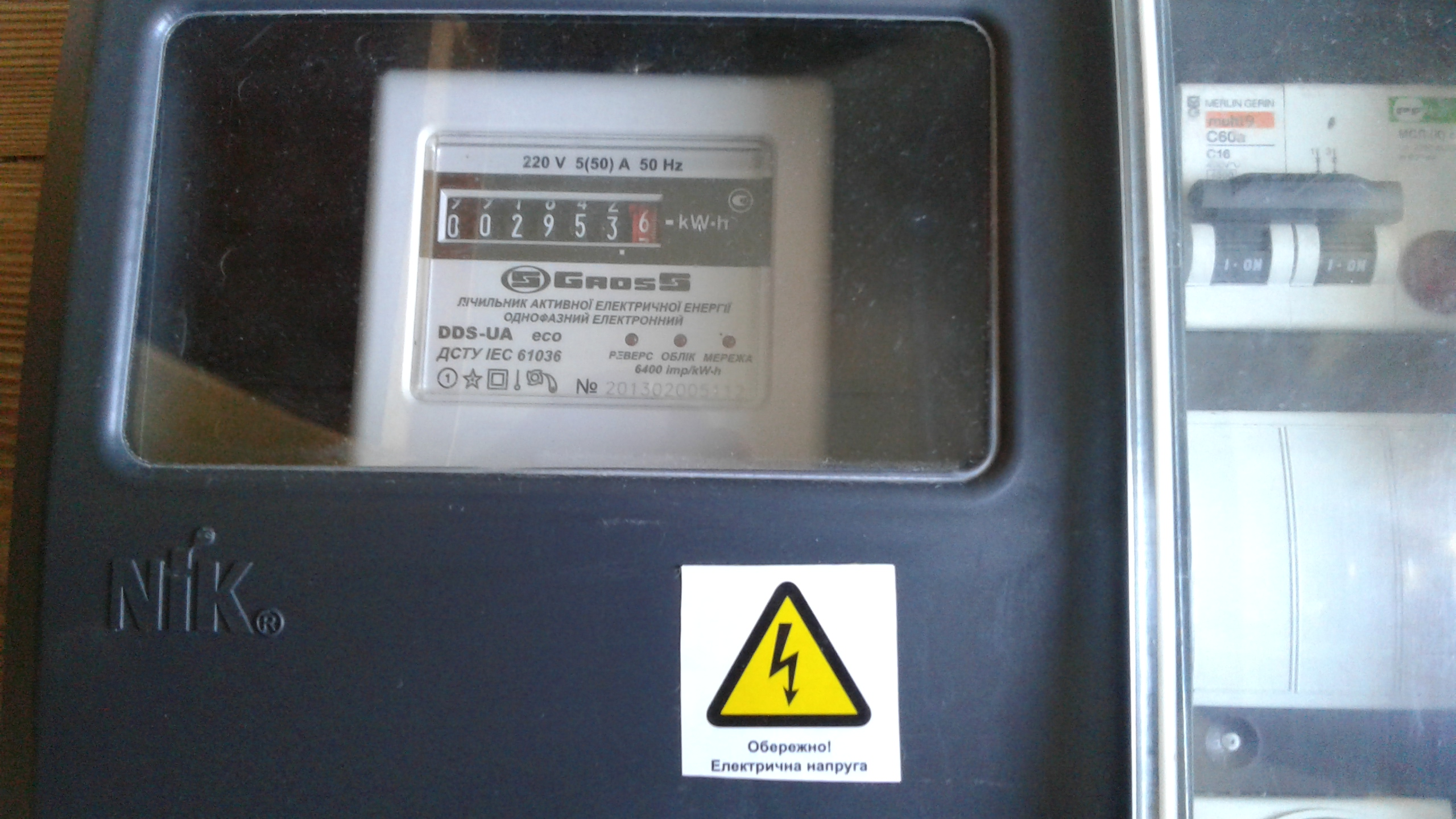 щиток обліку енергії